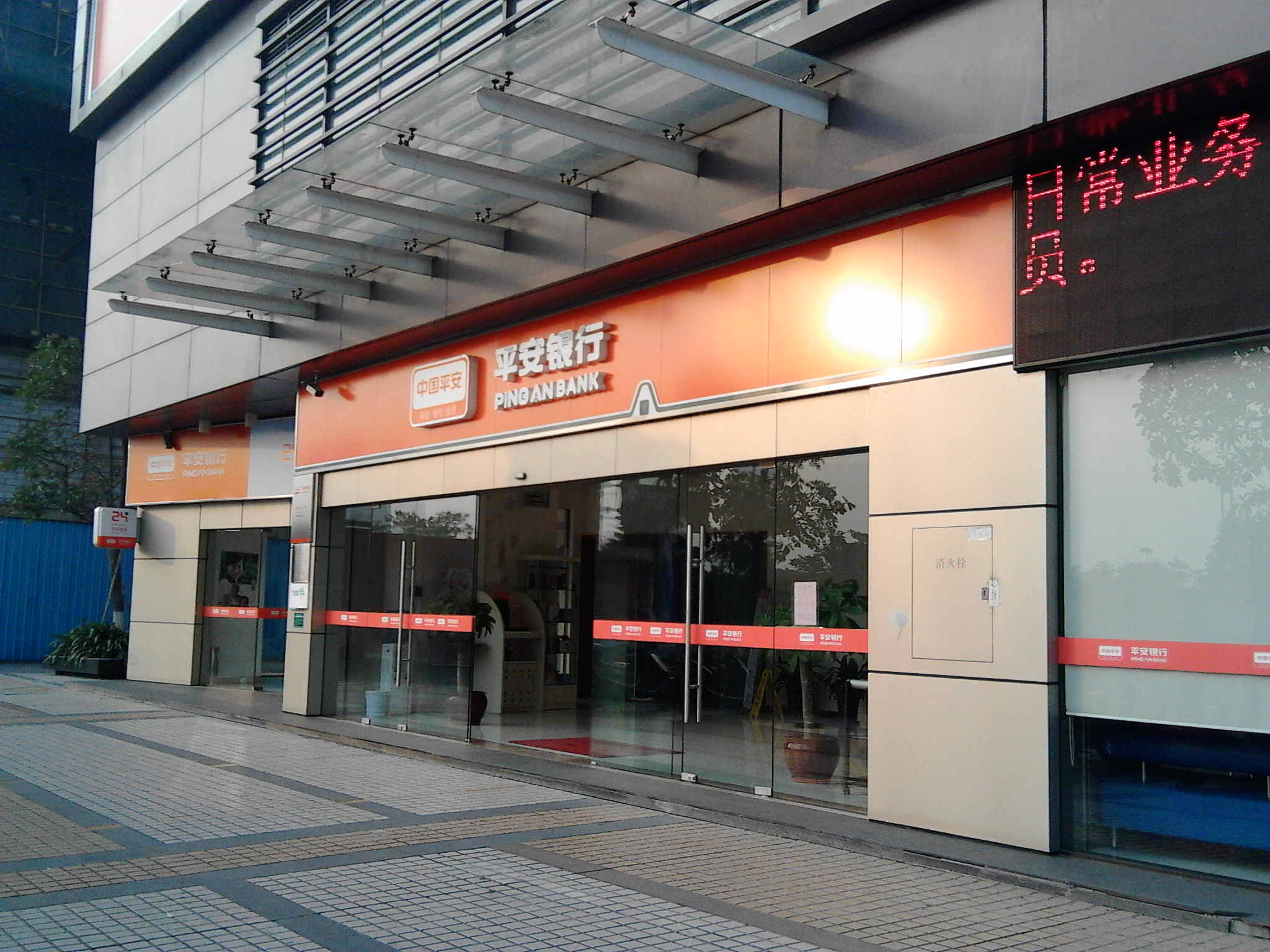 平安银行营业网点